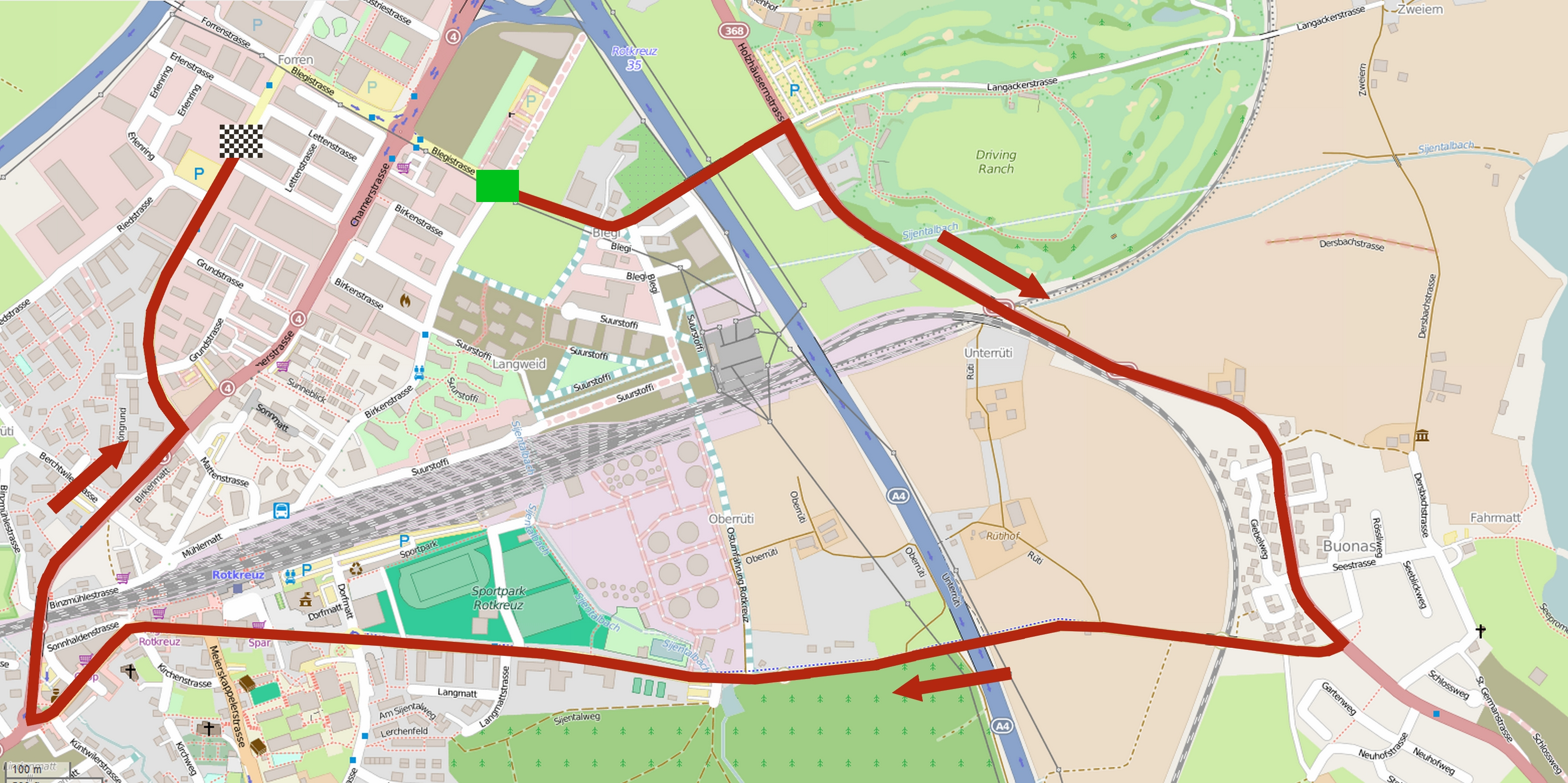 Parcours de la première étape du Tour de Suisse 2015 à Risch-Rotkreuz. . This map may be incomplete, and may contain errors. Don't rely solely on it for navigation.